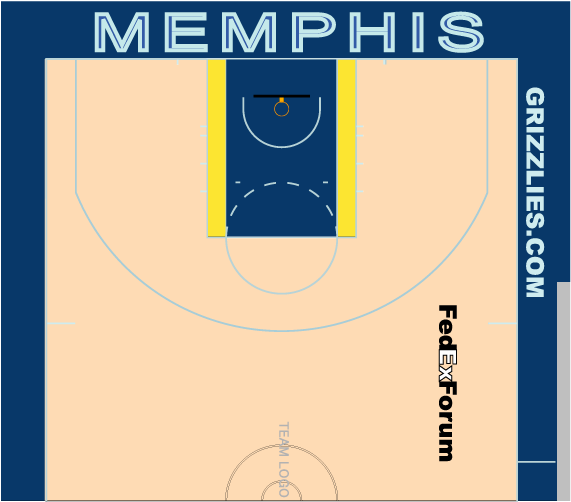 グリズリーズホームコート配色